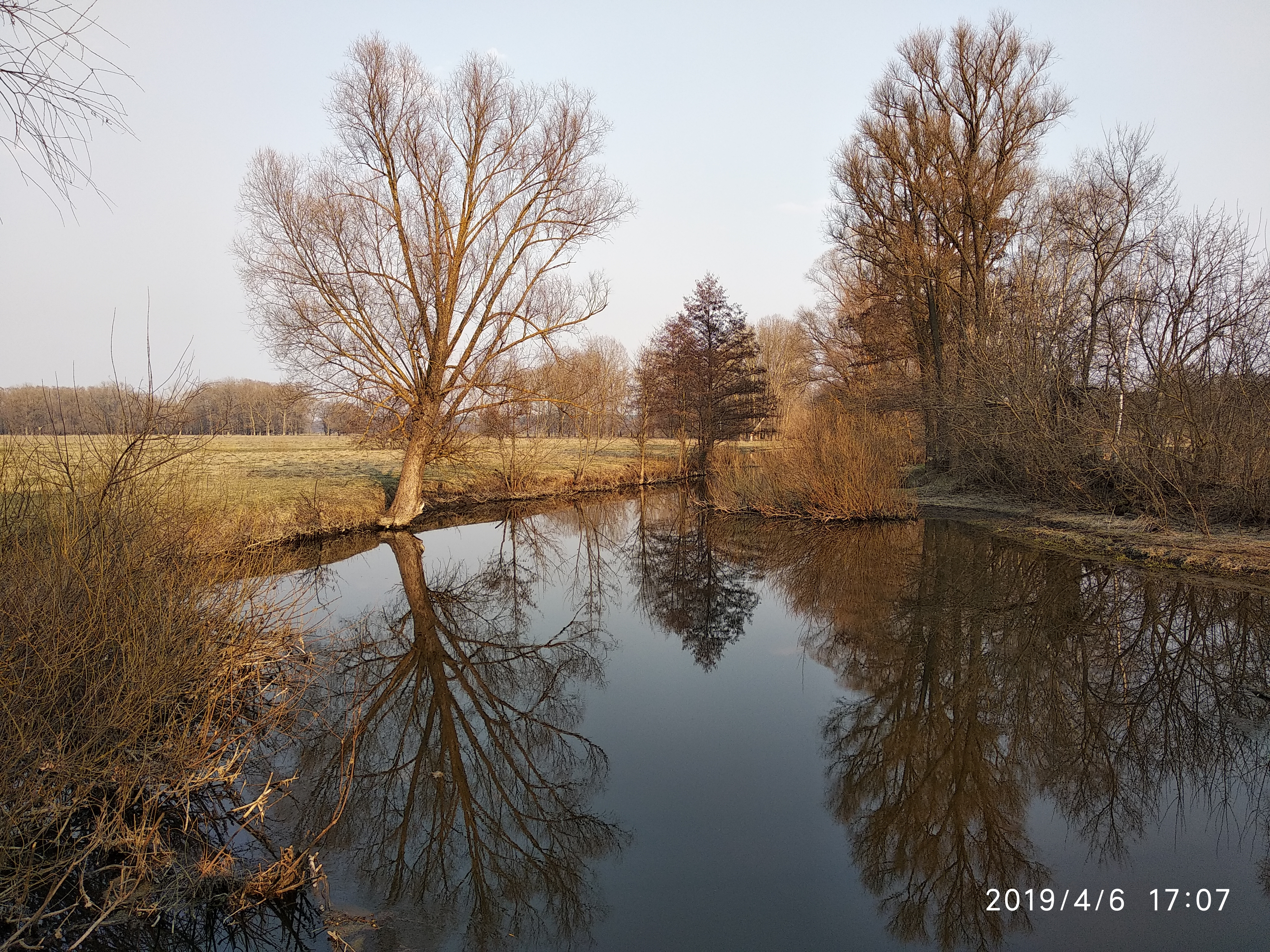 С. Вільшана